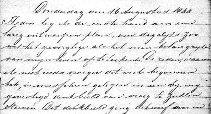 Een fragment van de eerste bladzijde van een dagboekje dat Hendrik Johan Rudolph Beijen in 1844 schreef.